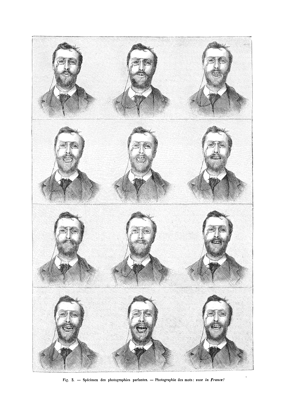 Chronophotographie de la bouche d'un sujet prononçant la phrase "vive la France".